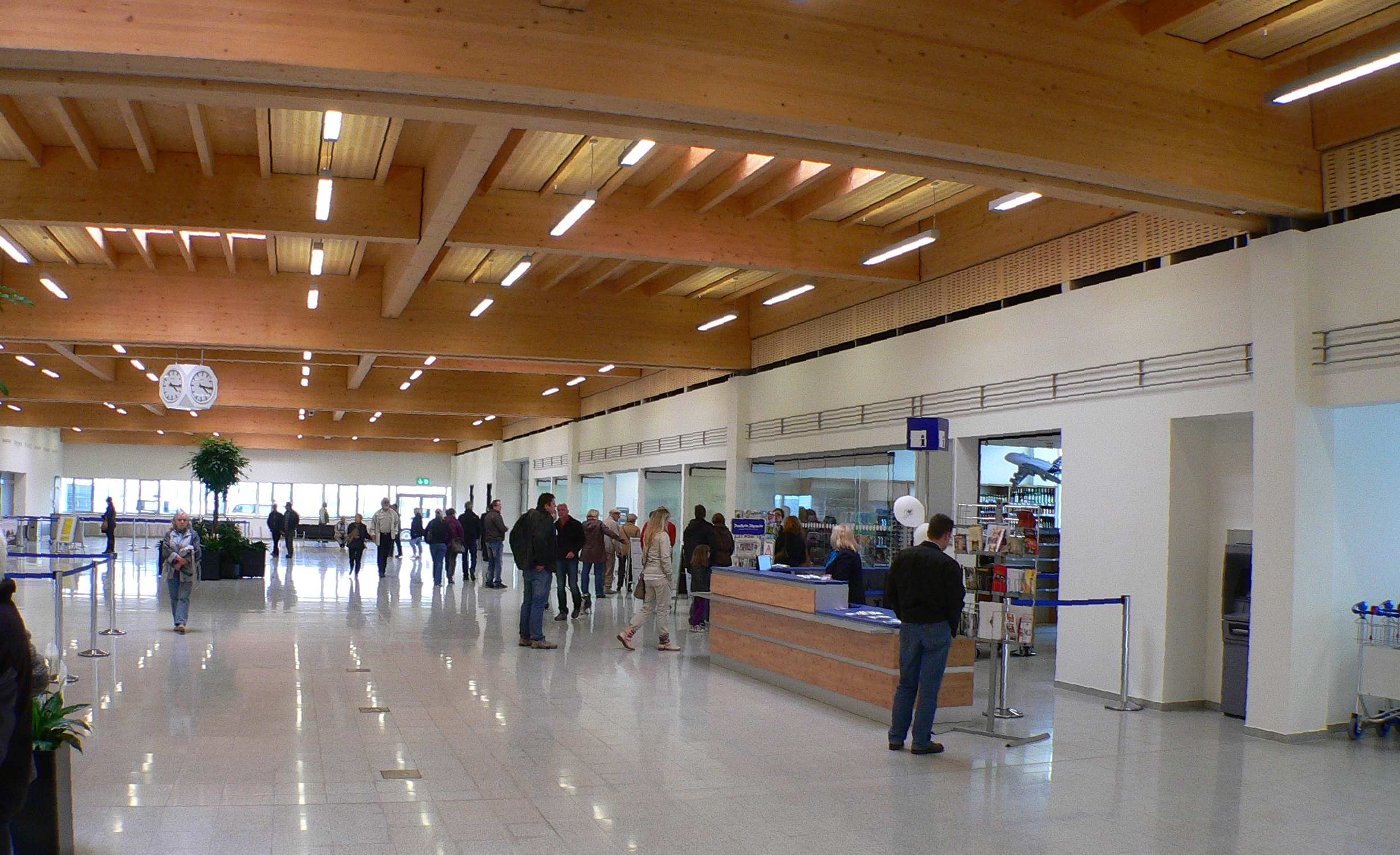 Flughafen Kassel-Calden, Empfangshalle